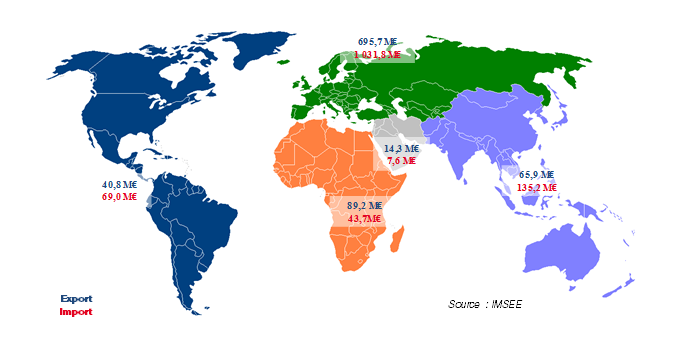 Внешнеторговый оборот Монако в 2016 году по географической зоне